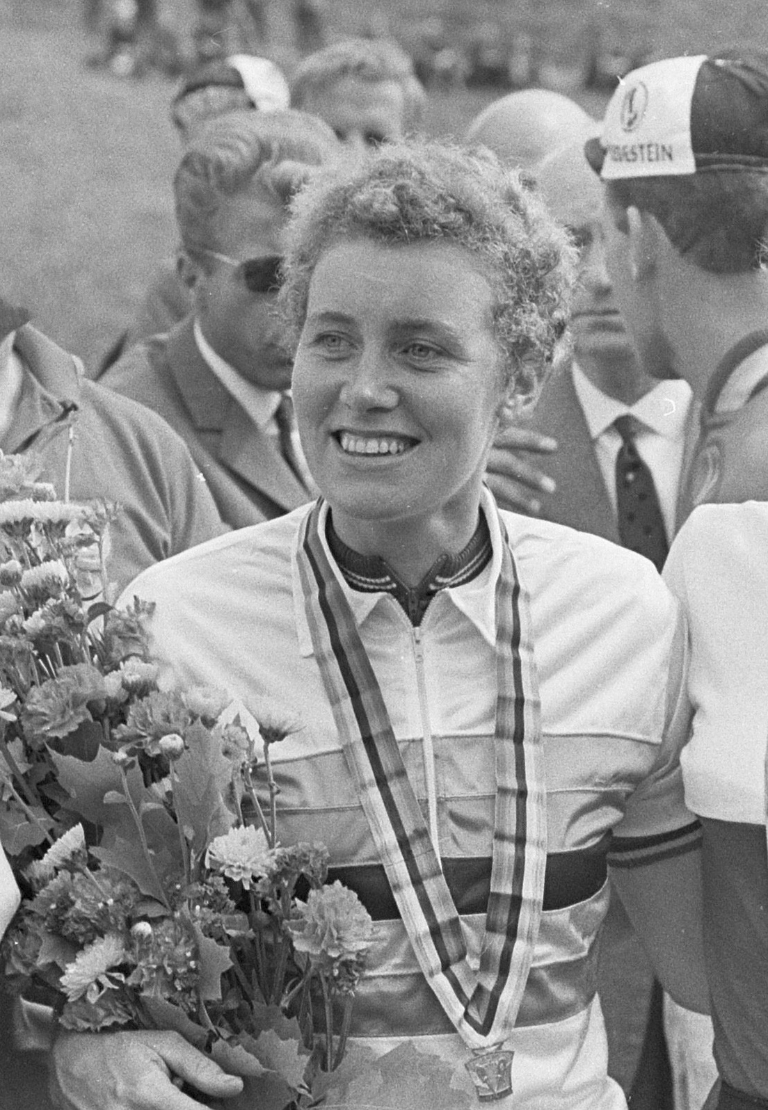 WK Wielrennen, Beryl Burton